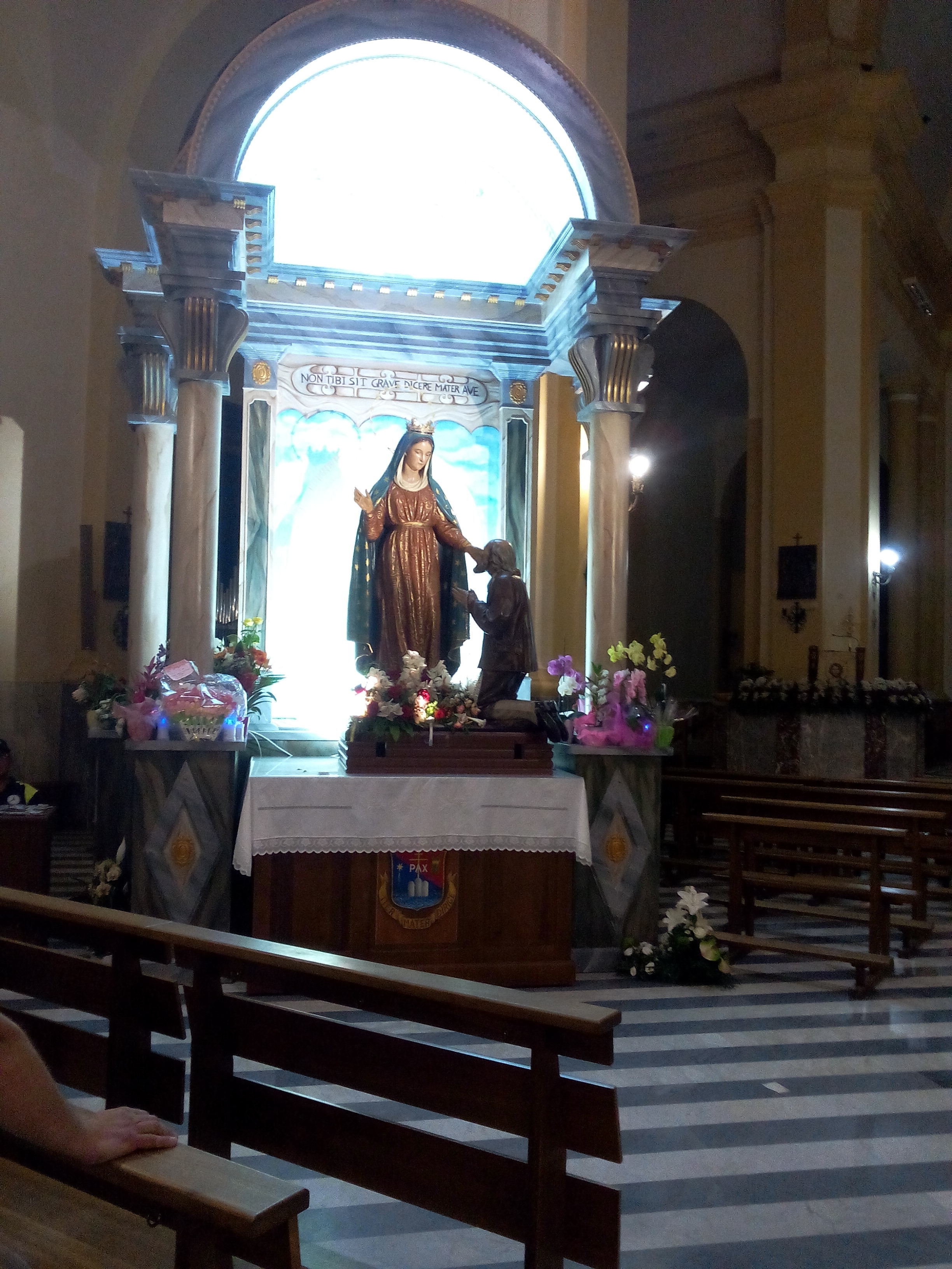 10 giugno 2018 Festa a Miracoli, Casalbordino. Statua della Madonna e del miracolato tornata nel Santuario dopo la processione della vigilia